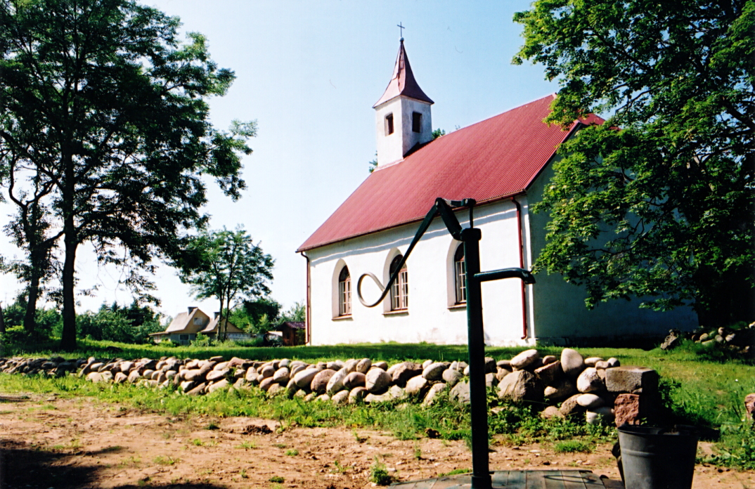 Randvere kirik